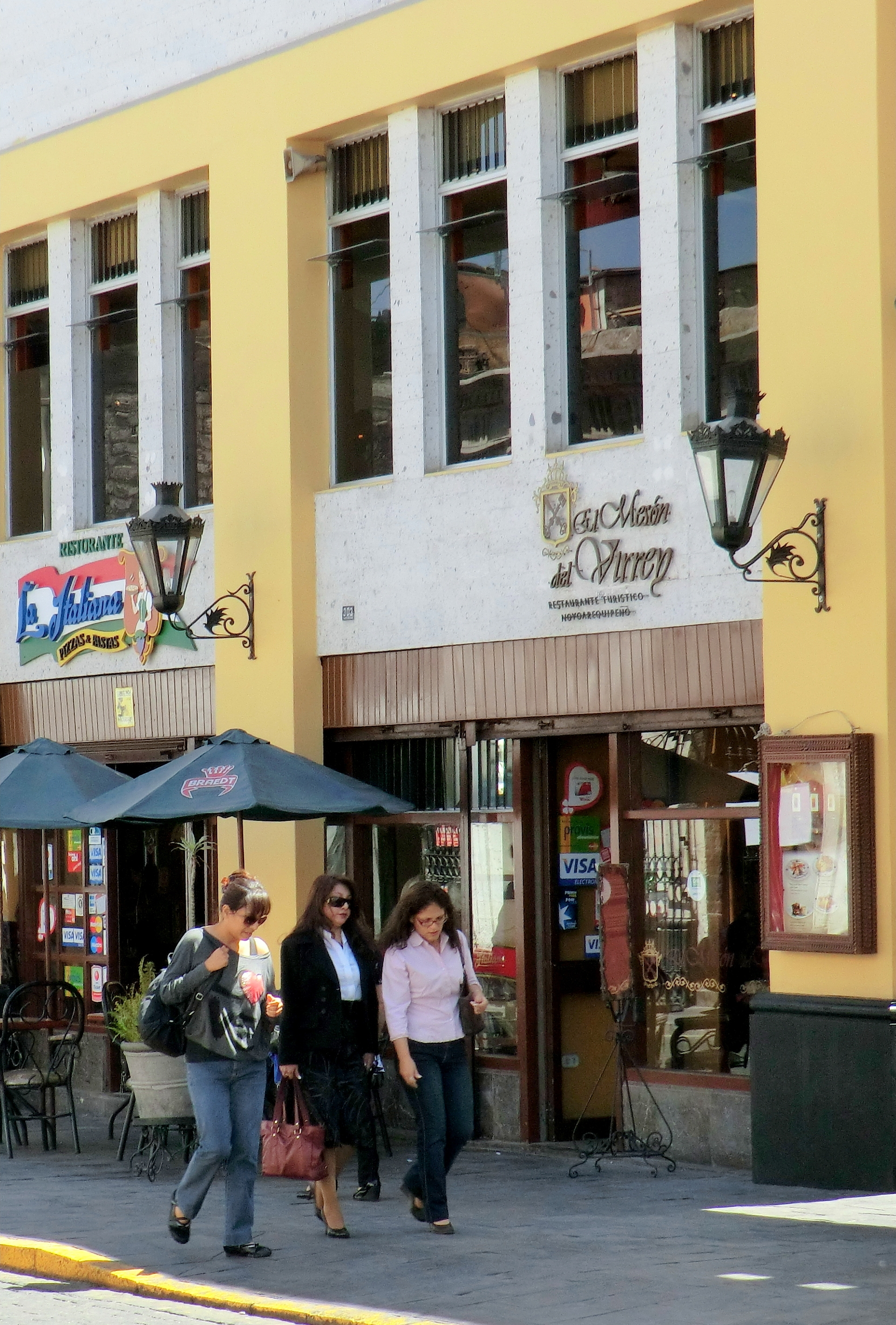 Cafes, pubs y bares de Arequipa